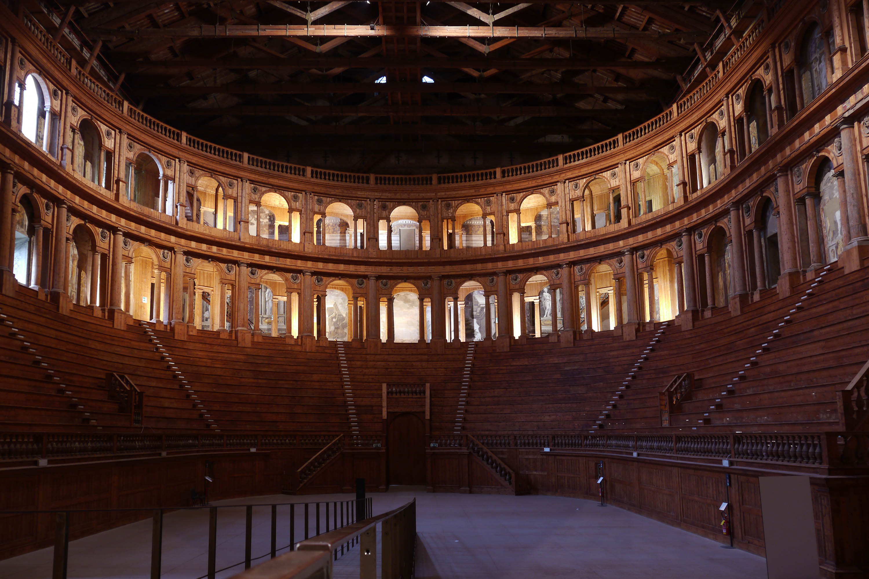 Teatro Farnesio en Parma, Italia.